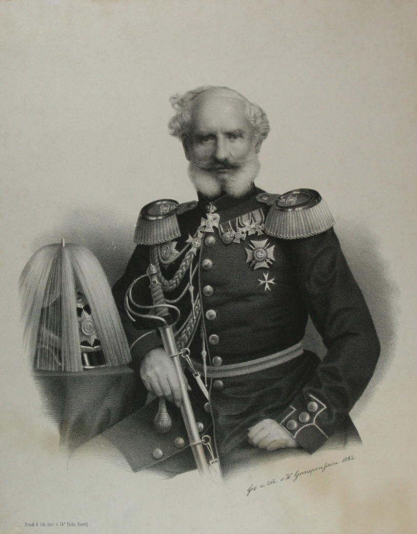 Porträt des August Friedrich Karl Freiherr von und zu Egloffstein (1771-1834). Der Generalmajor ist sitzend als Kniestück wiedergegeben. Er trägt Uniform und hält einen Degen in der rechten Hand. Der rechte Arm liegt auf einen Tisch aufgestützt, auf dem sein Helm liegt. Vorlage und druckgrafische Umsetzung stammen von Friedrich Wilhelm Graupenstein (1828-1897). Erschienen und gedruckt bei der Lithografisches Institut v. Ch. Fuchs in Hamburg.